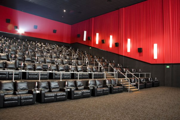 Salas Cinematograficas en México